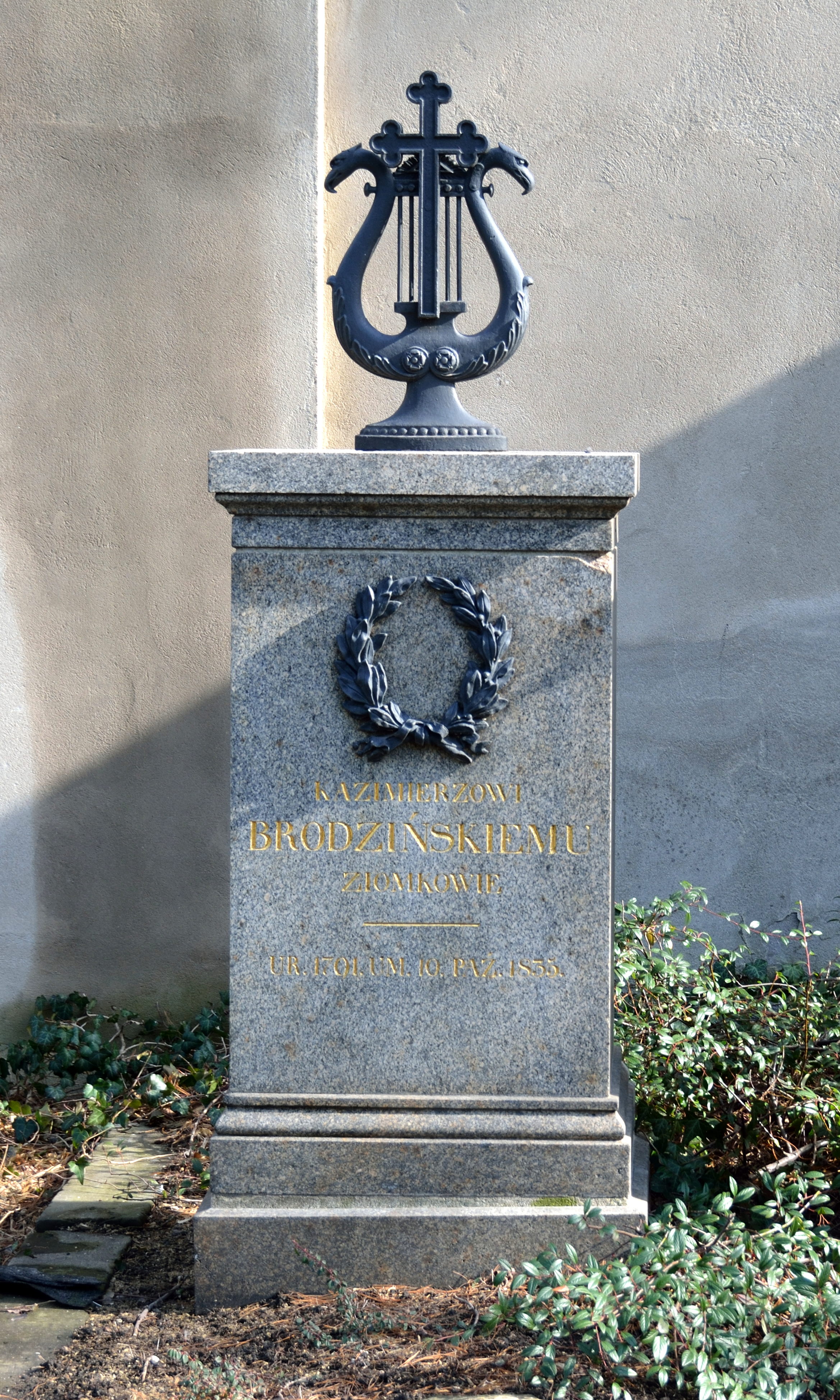 Dresden, Alter Katholischer Friedhof, Grab des Dichters Kazimierz Brodziński